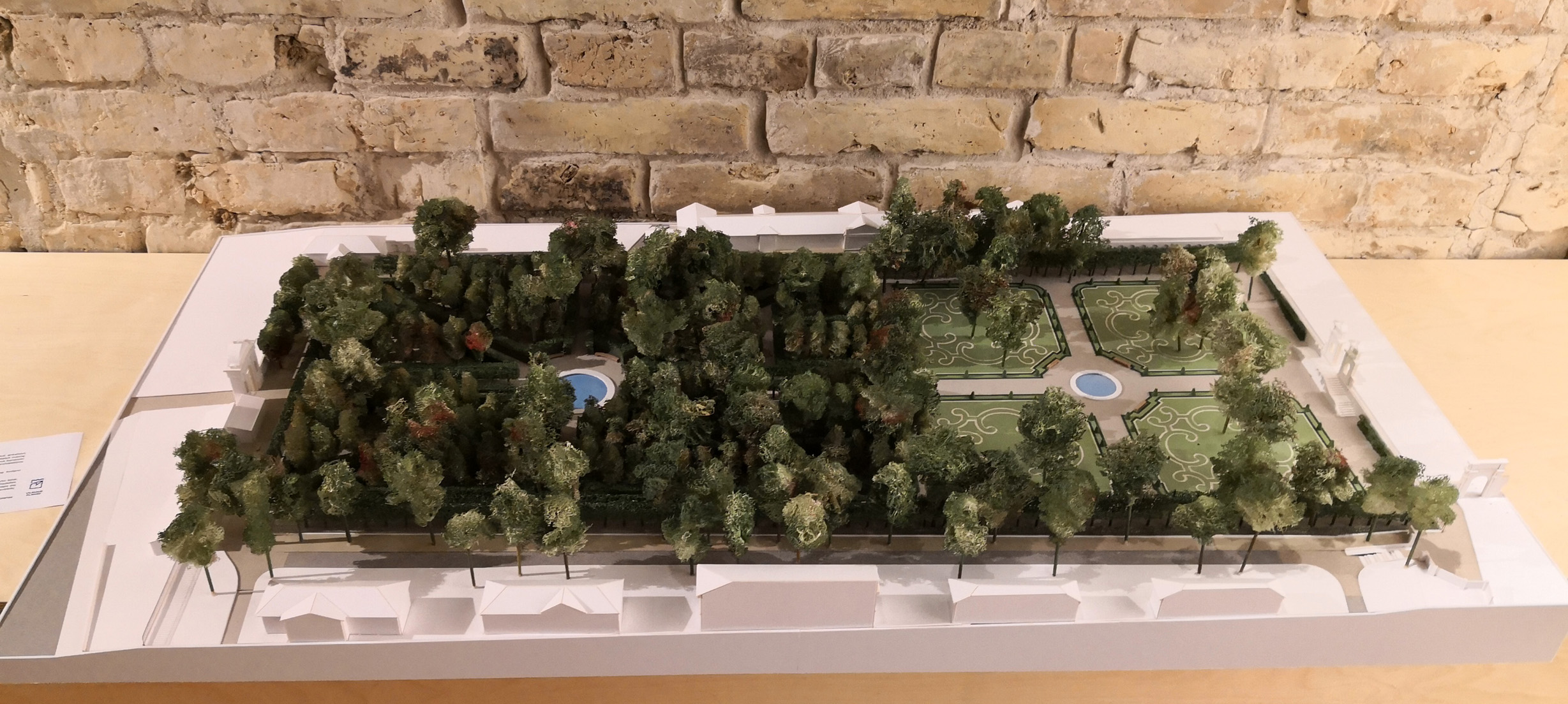 Sapiegų parko rekonstrukcijos projekto maketas, 2018 m. G. Kulikausko fotografija.